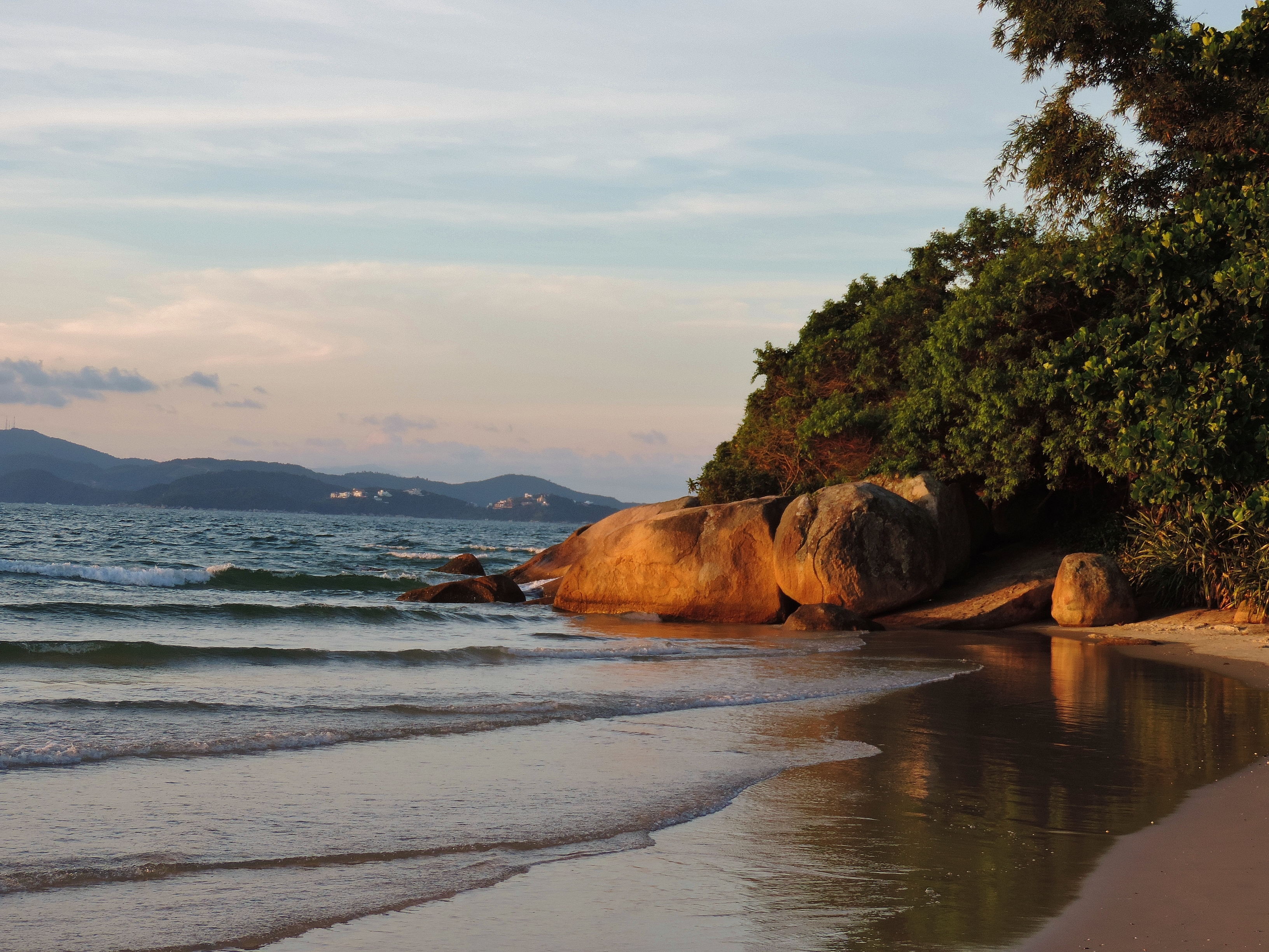 Pôr-do-sol na Praia do Forte, em Florianópolis